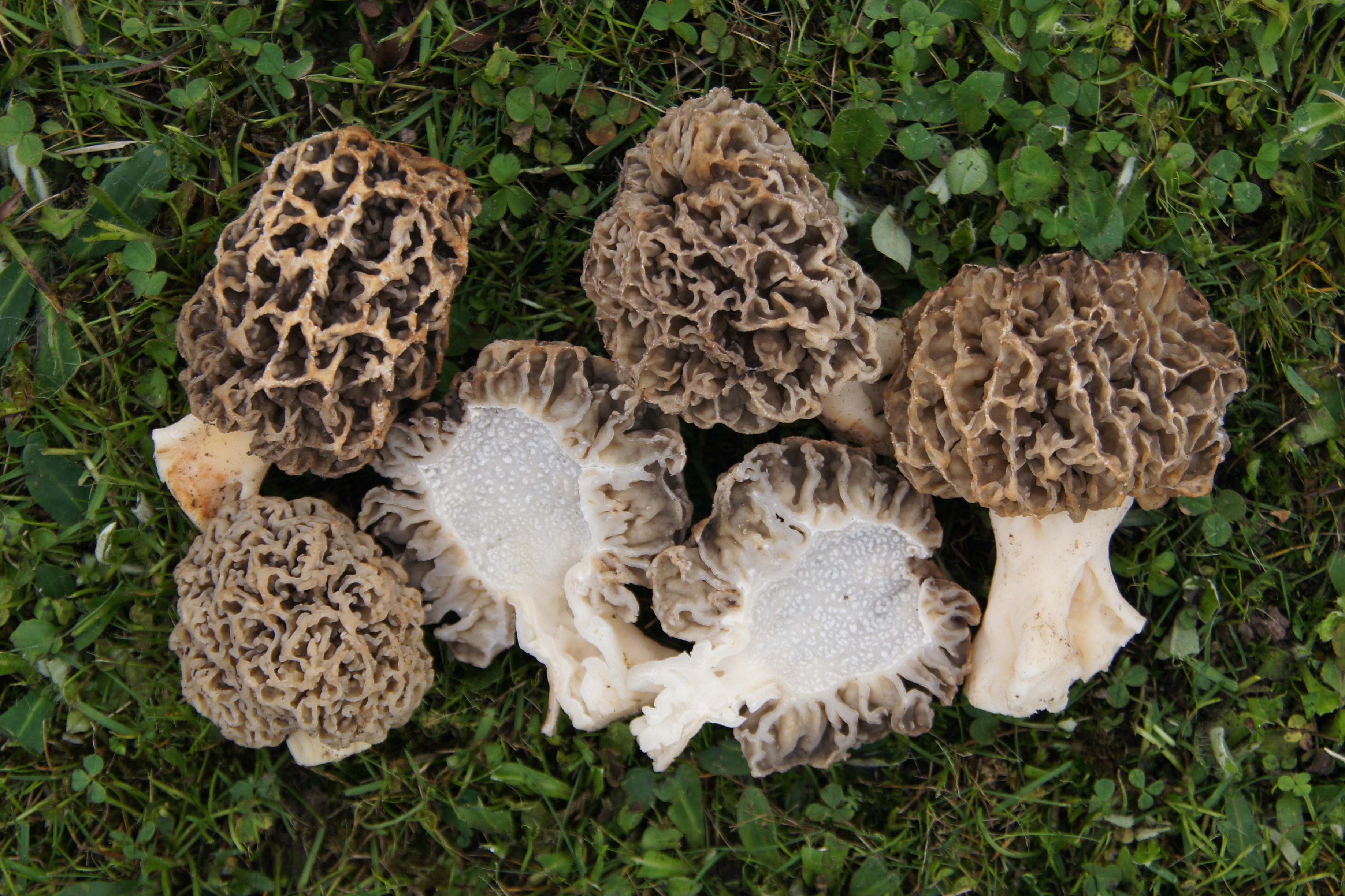 Morchella esculenta Fundort: DE - TH - LK SM Fundtag: 2013-05-01